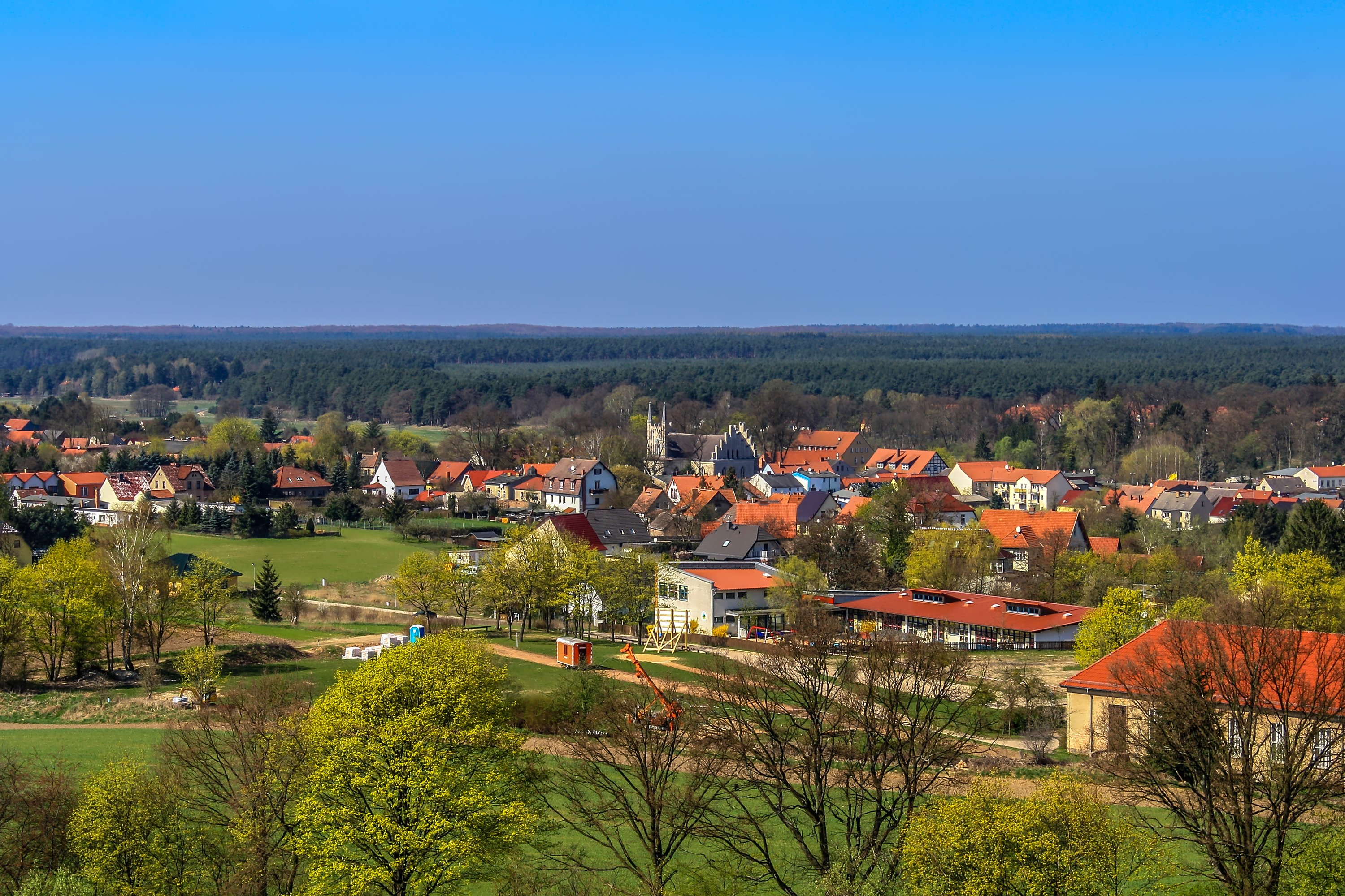 Joachimsthal/Barnim